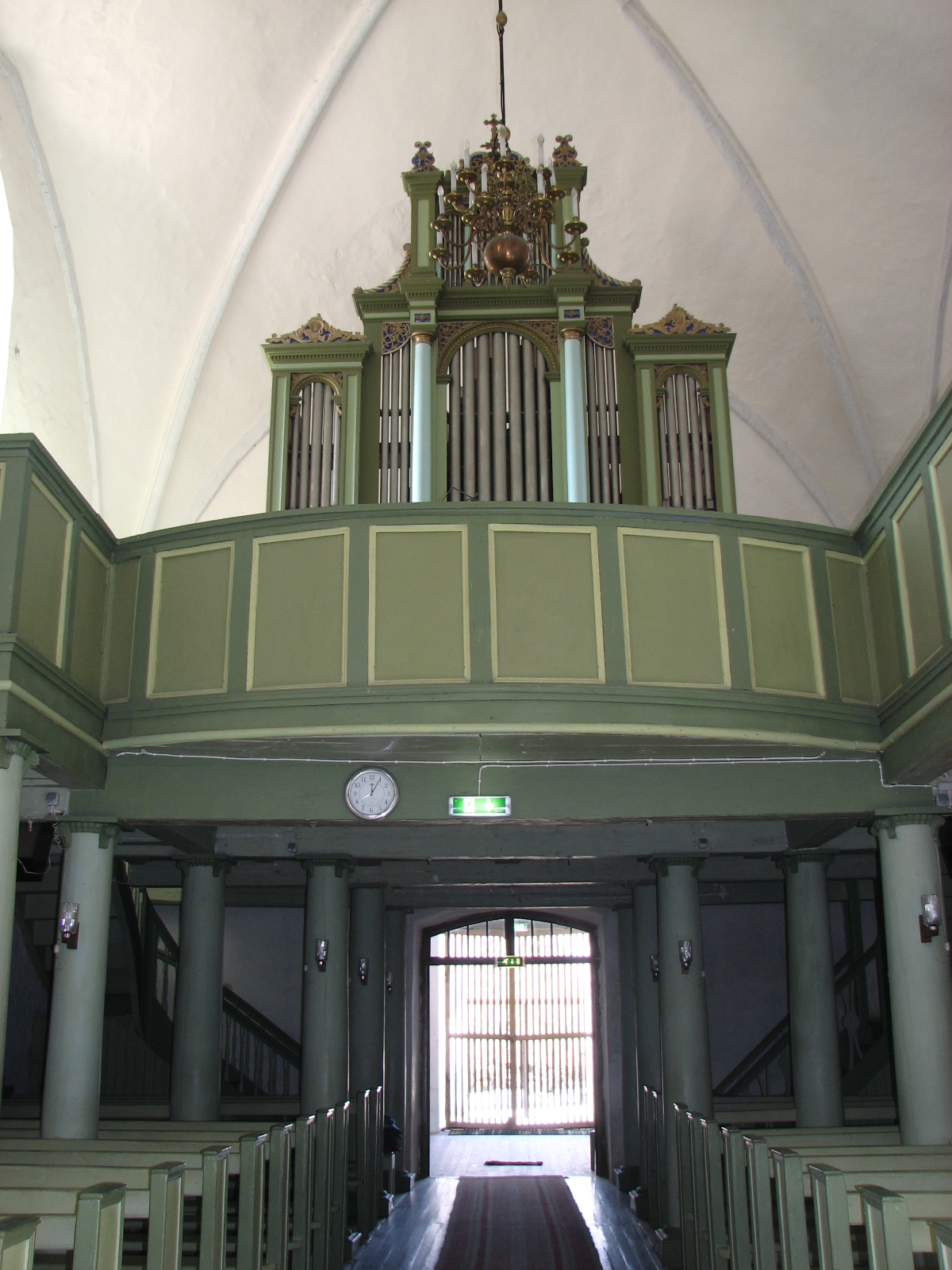 Kullamaa kiriku sisevaade. Üleval oreliprospekt, all peauks